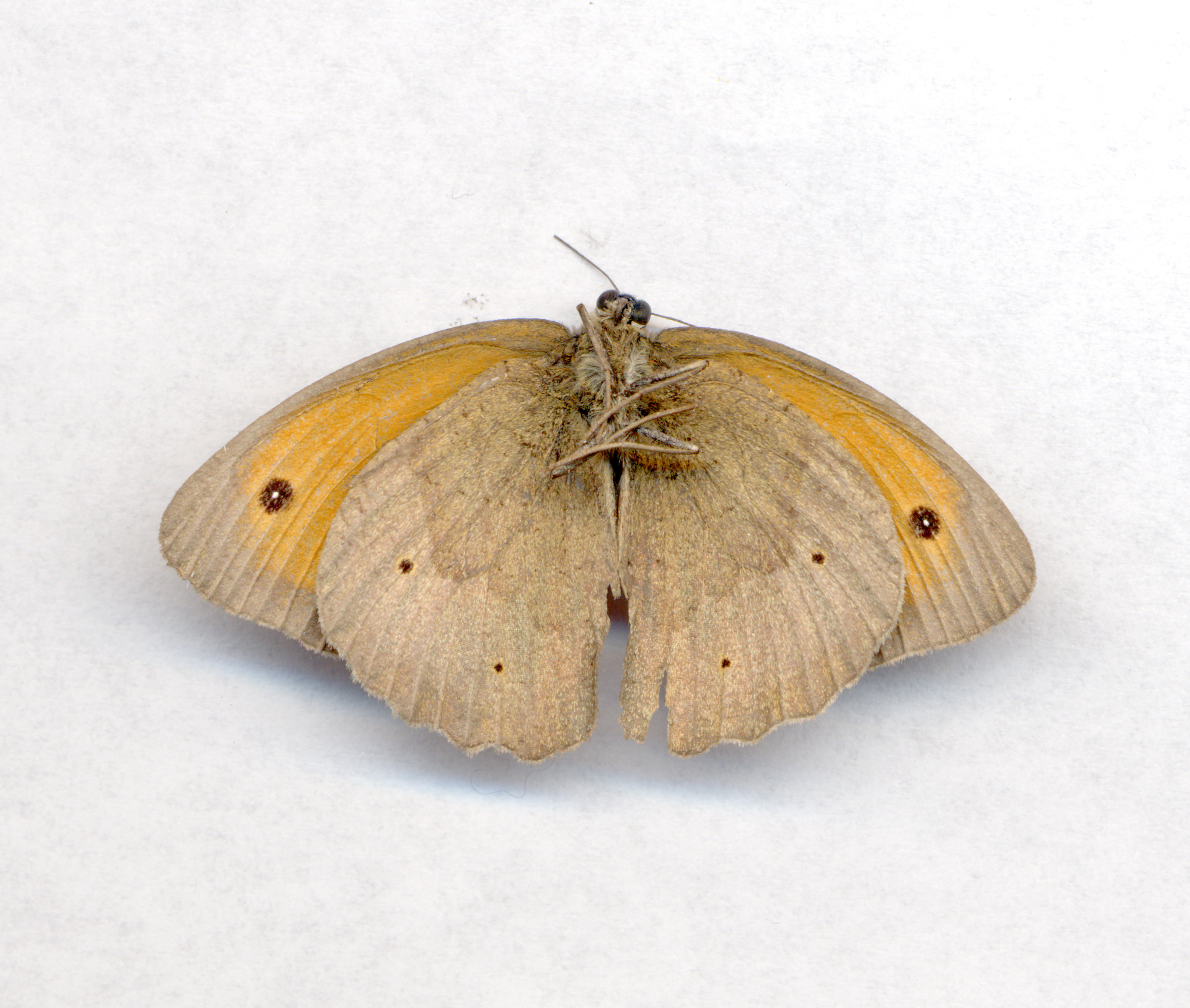 Papillon scanographié par Jordane Prestrot.